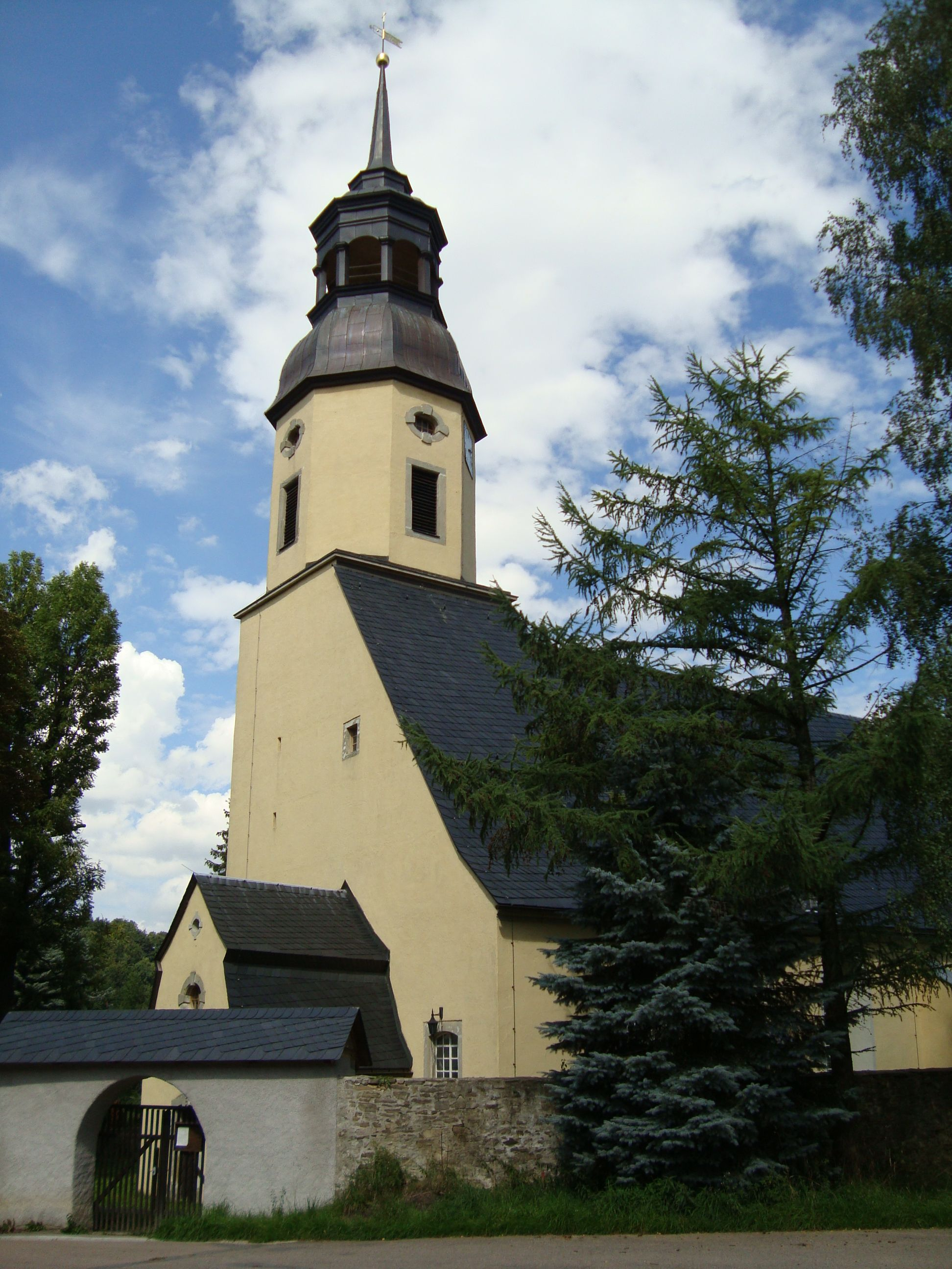 Evangelische Kirche in Dorfchemnitz im Erzgebirge